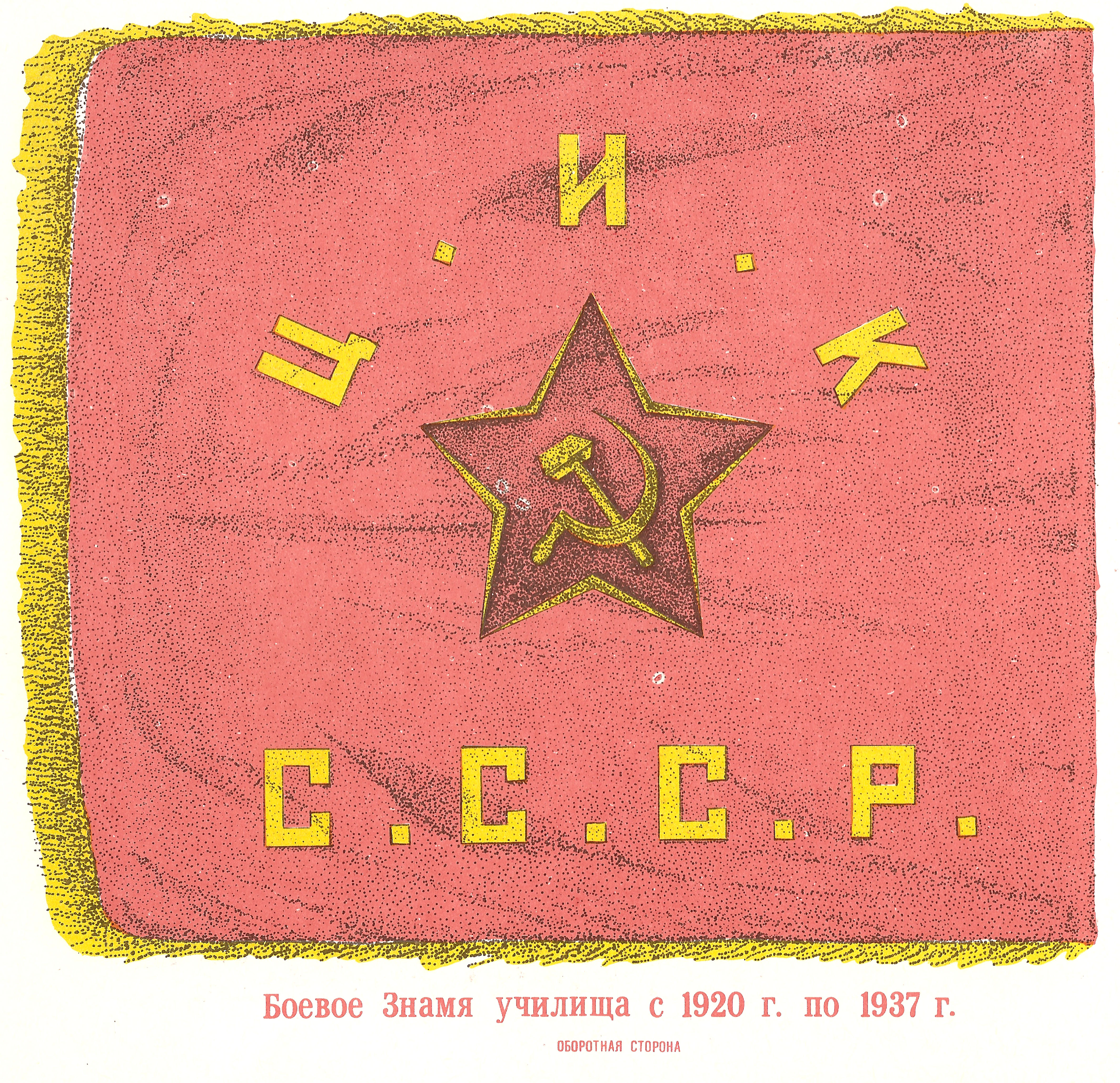 Изображение боевого знамени военно-топографического училища в период 1920 по 1937 года. (оборотная сторона)